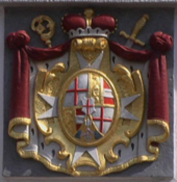 Bischofswappen (1778) des Konstanzer Bischofs Maximilian Christof von Rodt oberhalb der Eingangstür des ehemaligen Pfarrhauses (Schlaate)